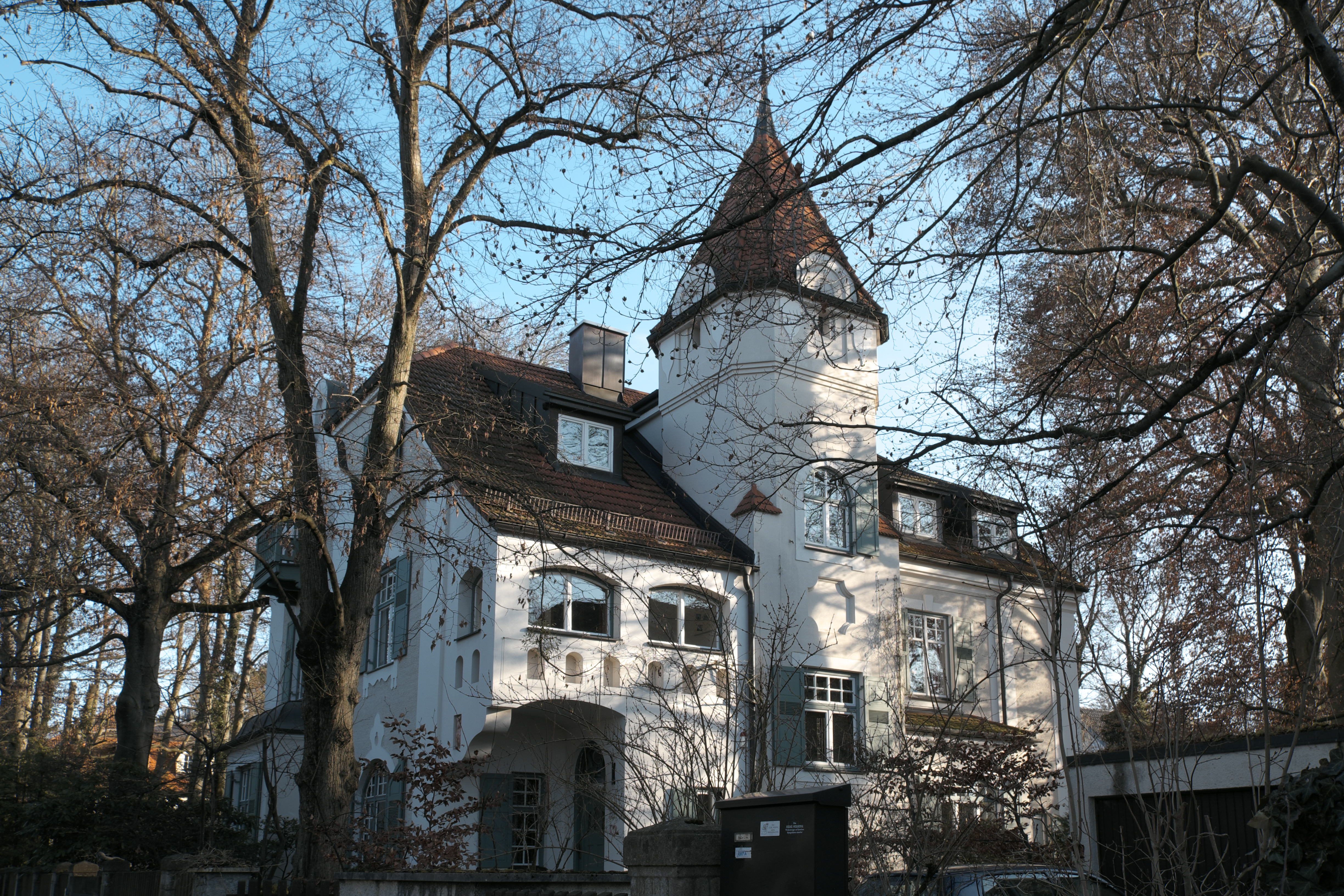 Villa in der Rubensstraße 17 in Obermenzing im Stadtbezirk Pasing-Obermenzing in München (Bayern/Deutschland)